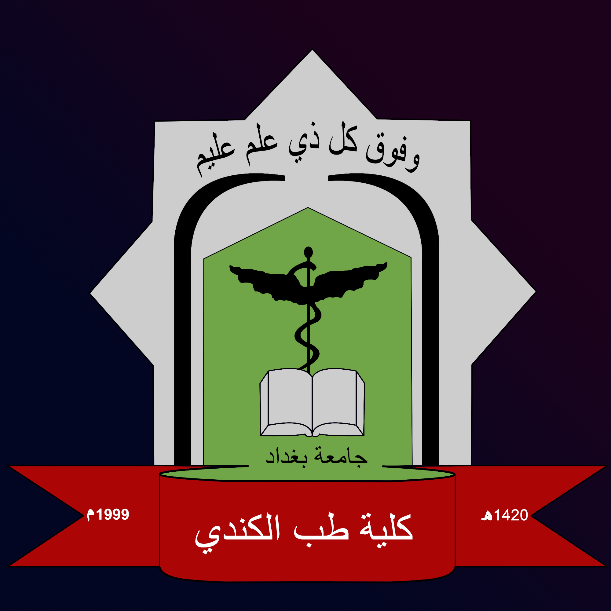 كلية طب الكندي